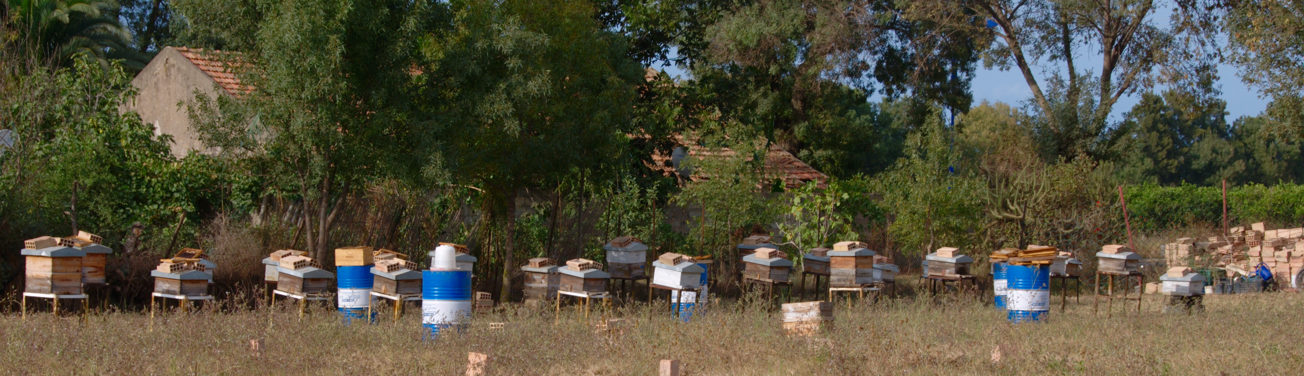 Ruches à Béjaïa, près de l'aéroport